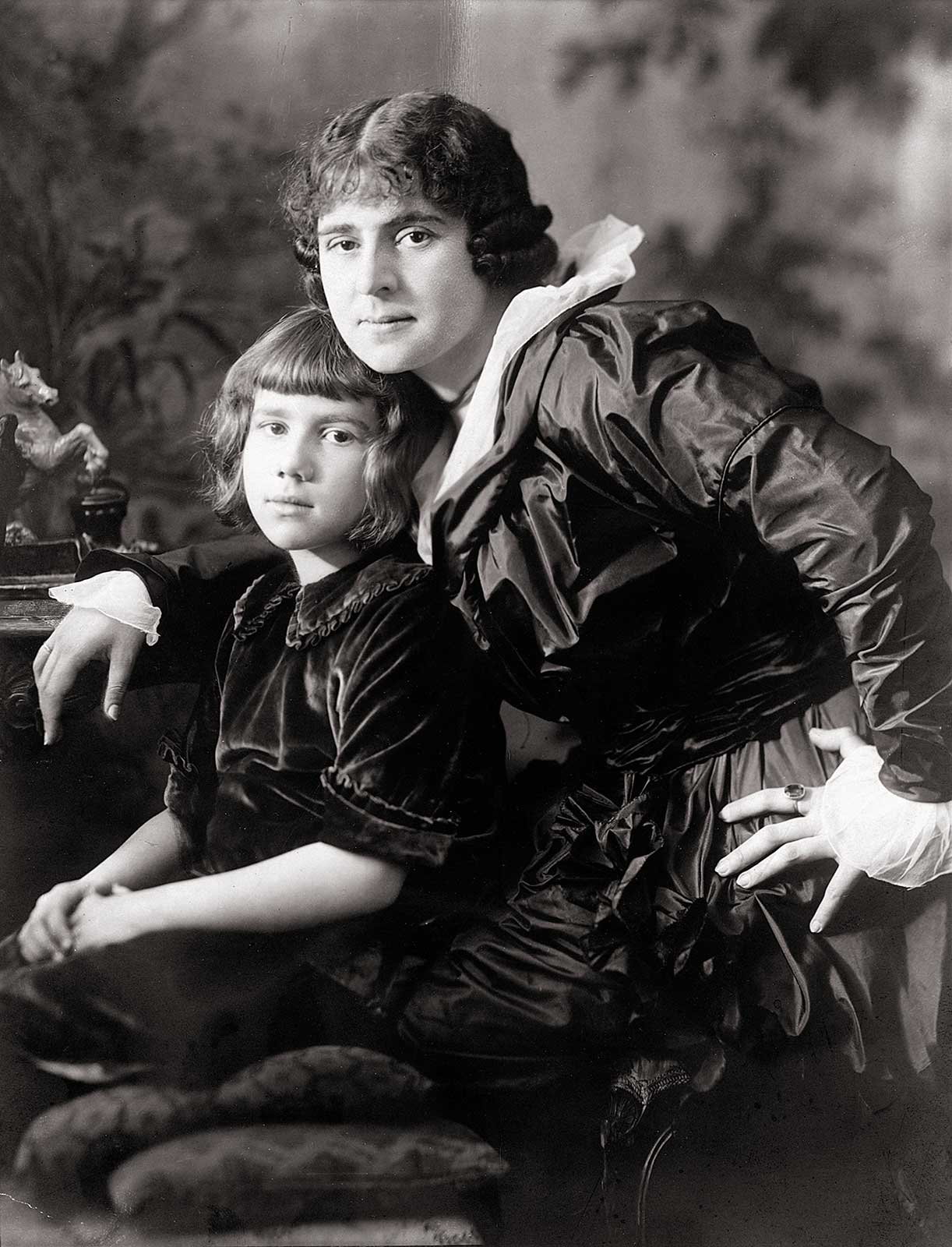 Thea Sternheim mit ihrer Tochter Dorothea (alias "Mopsa") c. 1913